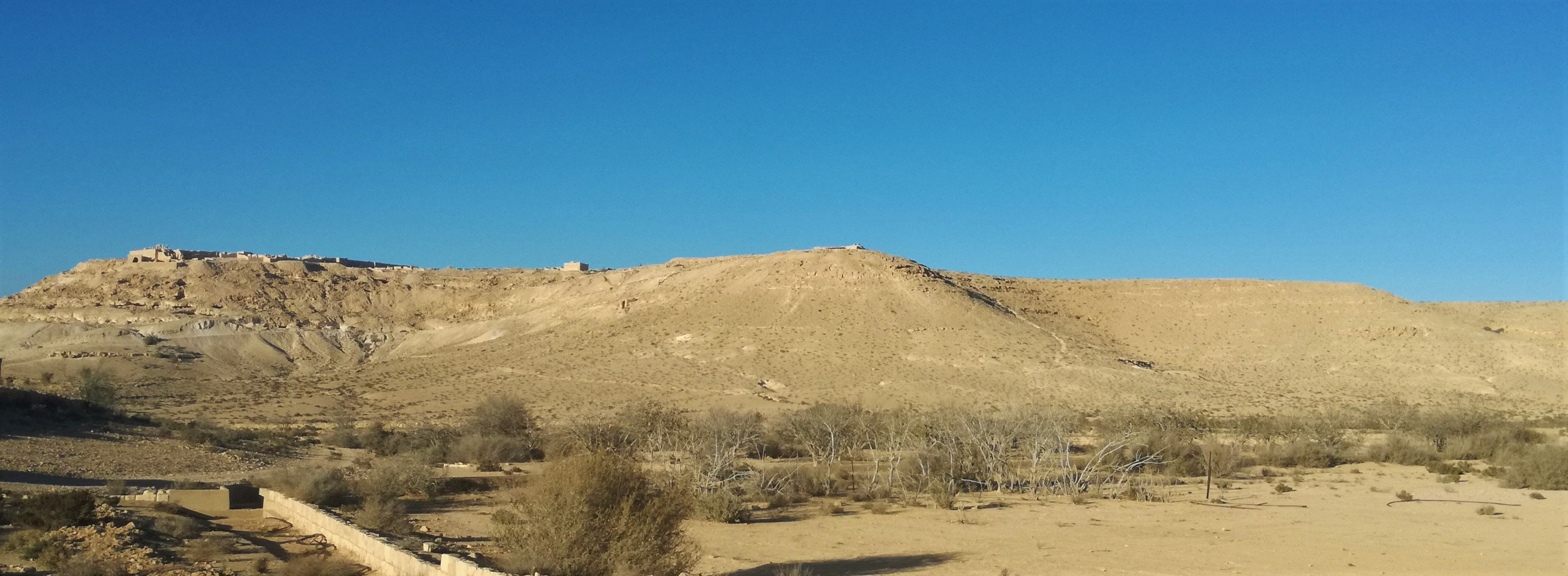 חוות אבן ארי בעבדת והעיר עבדת ברקע